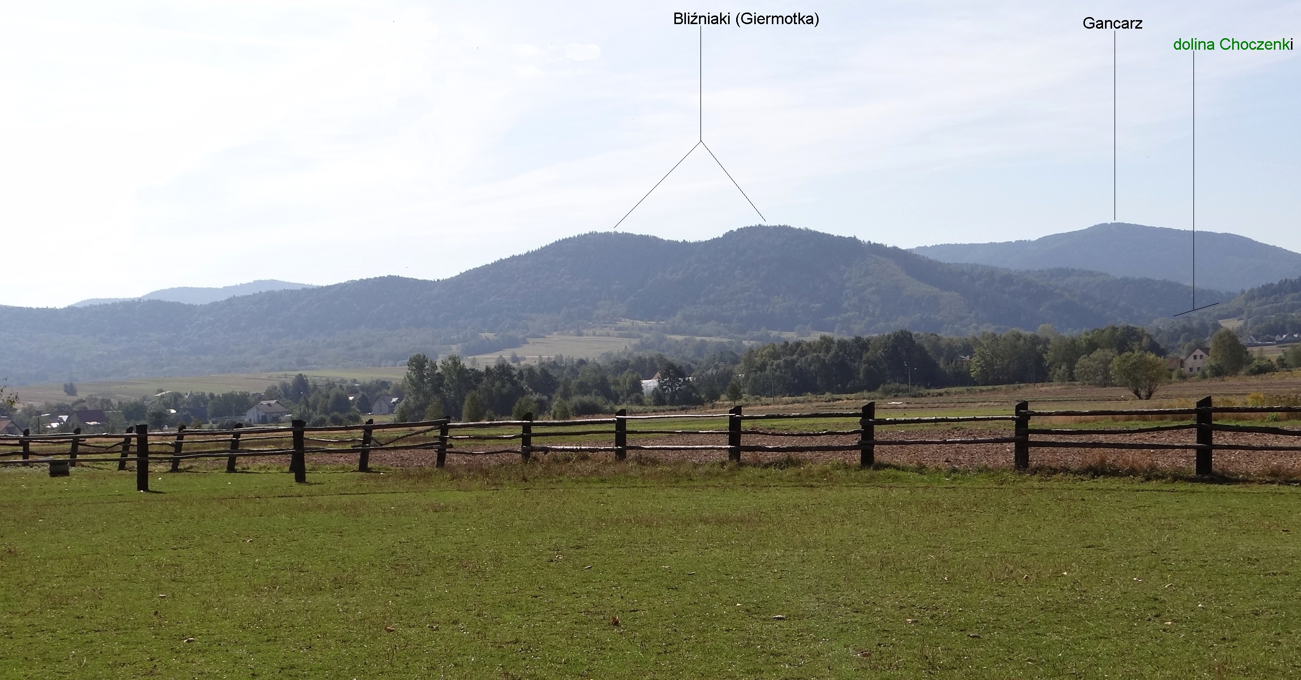 Widok z Choczni na Bliźniak, Gancarza i dolinę Choczenki